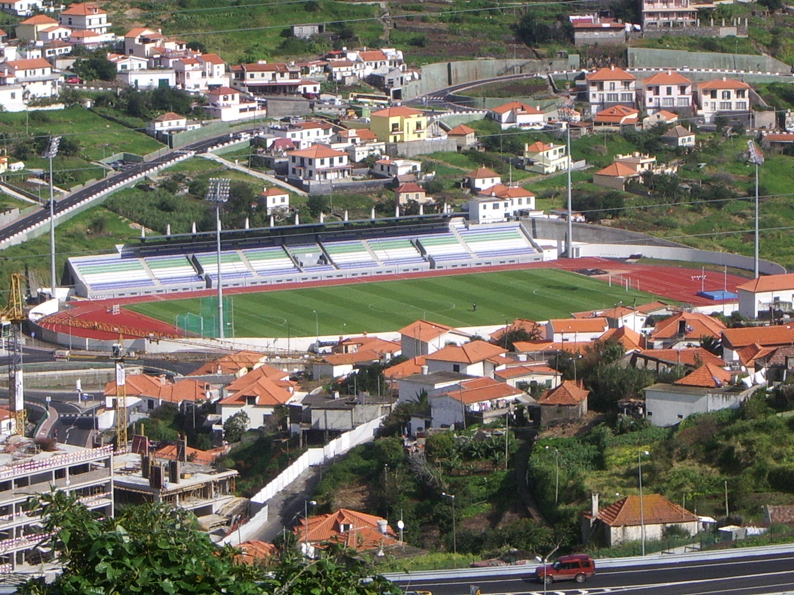 Estádio Municipal de Machico.